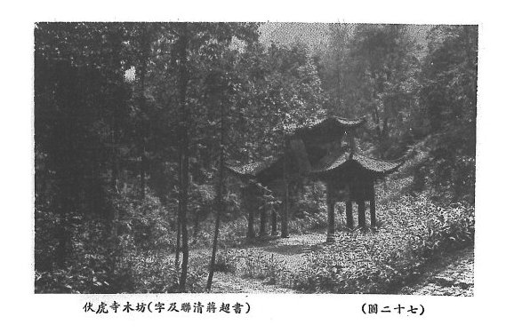 峨眉山老照片